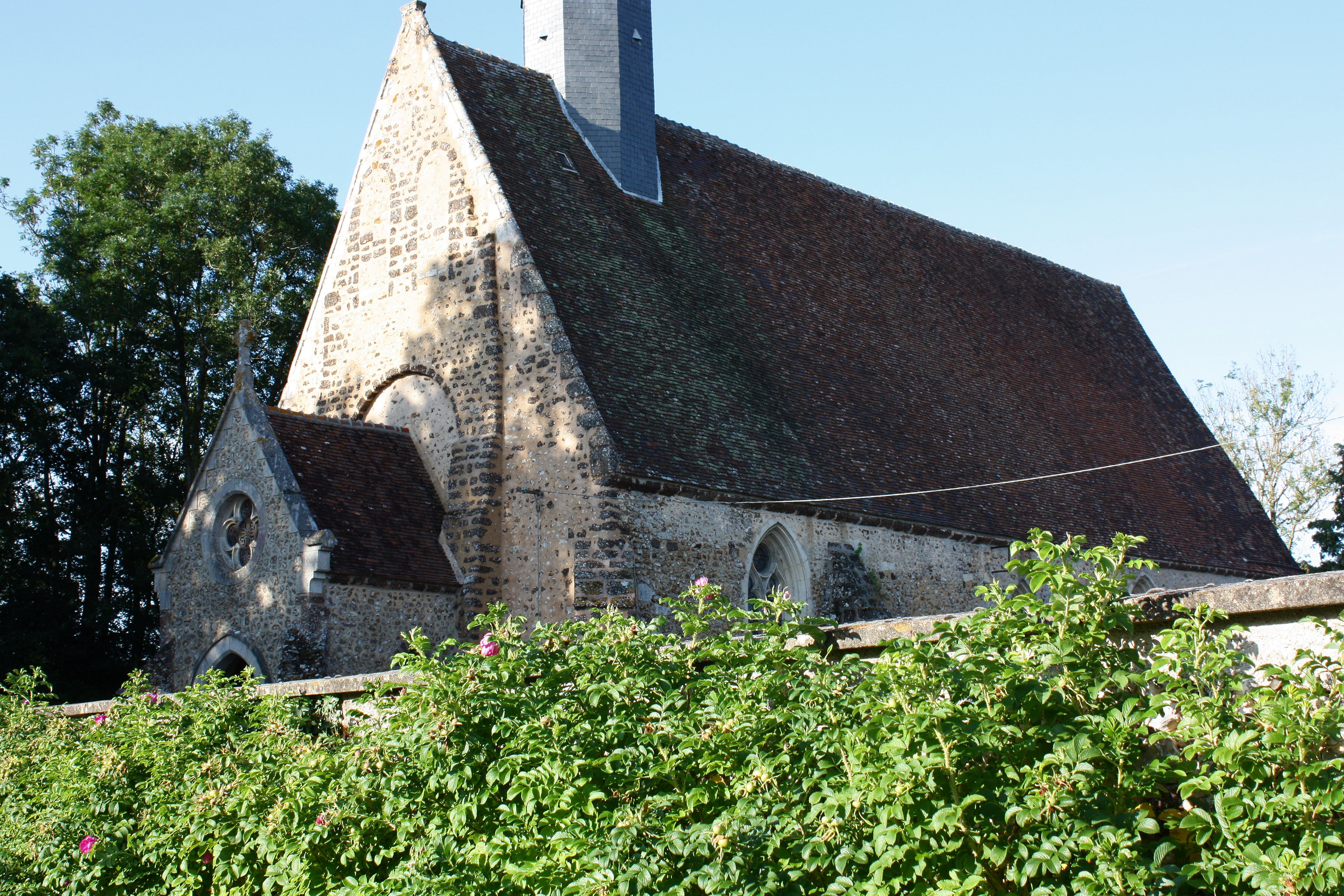 Nonvilliers - Eglise Saint-Anastase Vue générale au Sud-Ouest